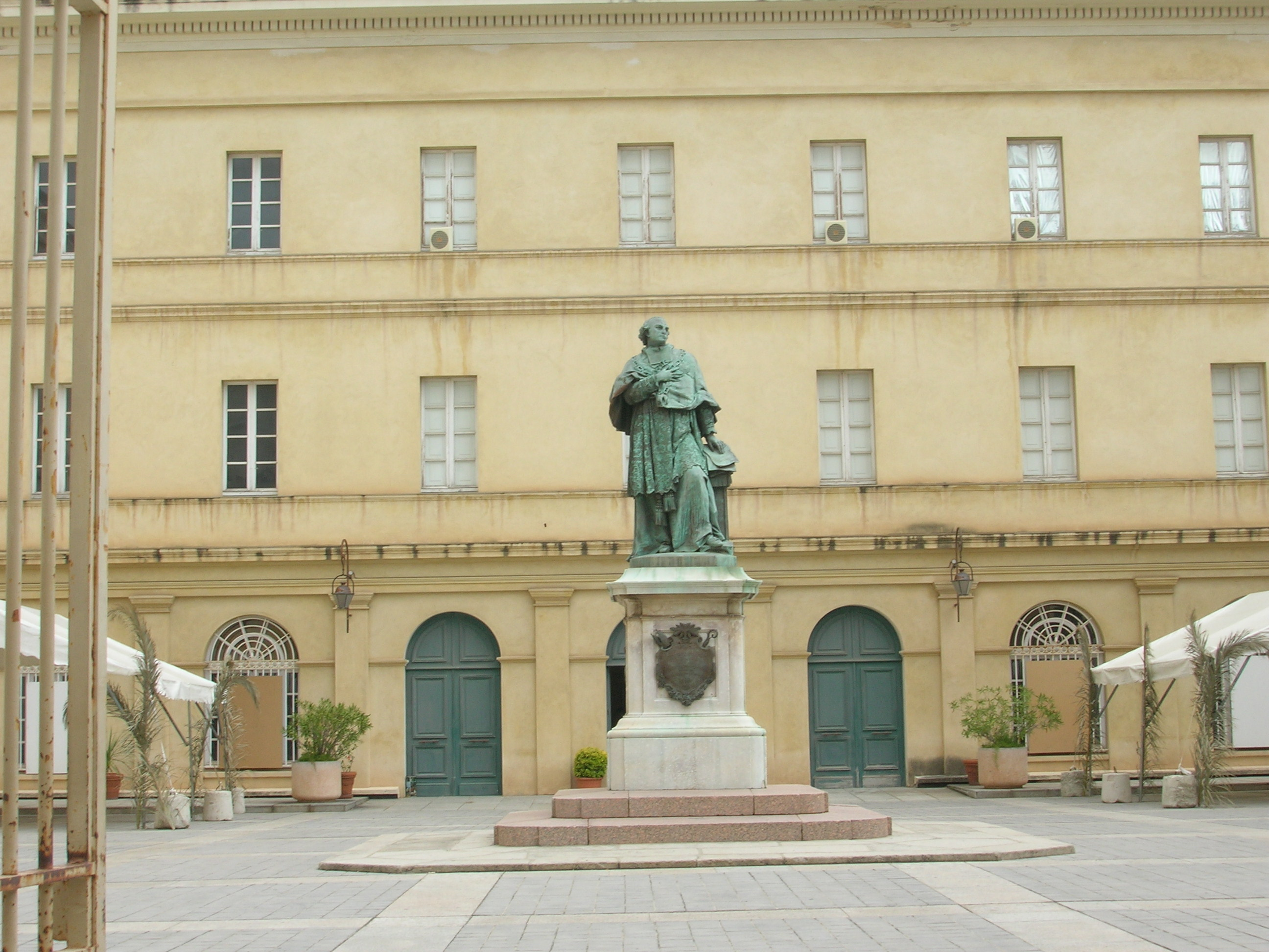 De Musee Fesch